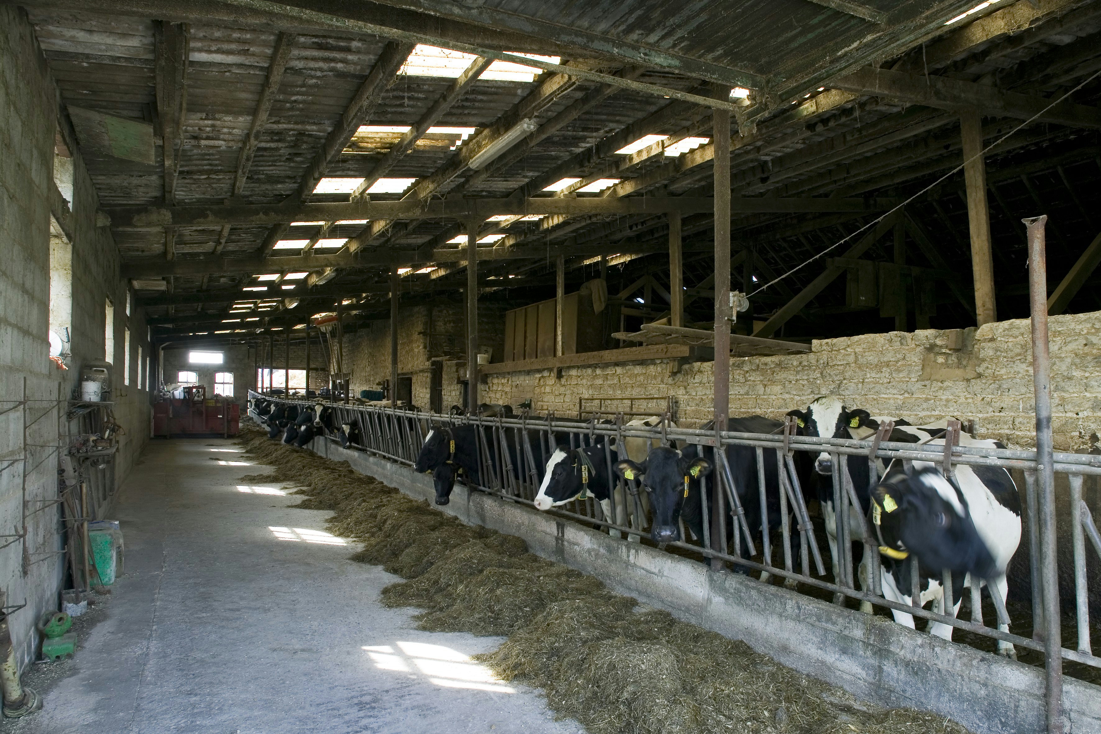 Hoeve Overhuizen: Interieur, overzicht koeienstal